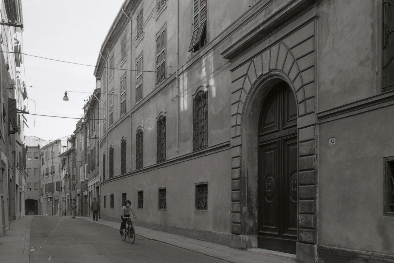 Servizio fotografico : Ferrara, 1974 / Paolo Monti. - Strisce: 7, Fotogrammi complessivi: 37 : Negativo b/n, gelatina bromuro d'argento/ pellicola ; 35 mm. - ((Sul portanegativi: N[I]K[MA]T FP4. - N.B. Possibile sottoserie (1):. - 14-21 = Chiesa e piazzetta antistante. - Occasione: Documentazione del centro storico. - Fonte: Agenda di Paolo Monti: Leica 1501-3000 Controllo numerazione (1950-1978), presso Archivio Paolo Monti. - Fonte: Fattura di Paolo Monti: IV. Commesse/ Fattura n. 18/ Riprese fotografiche del centro storico (Mostra Vitalità del centro storico) (1974/10/16), presso Archivio Paolo Monti